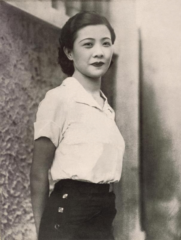 Жуан Линъюй - китайская актриса 30-гг. XX века